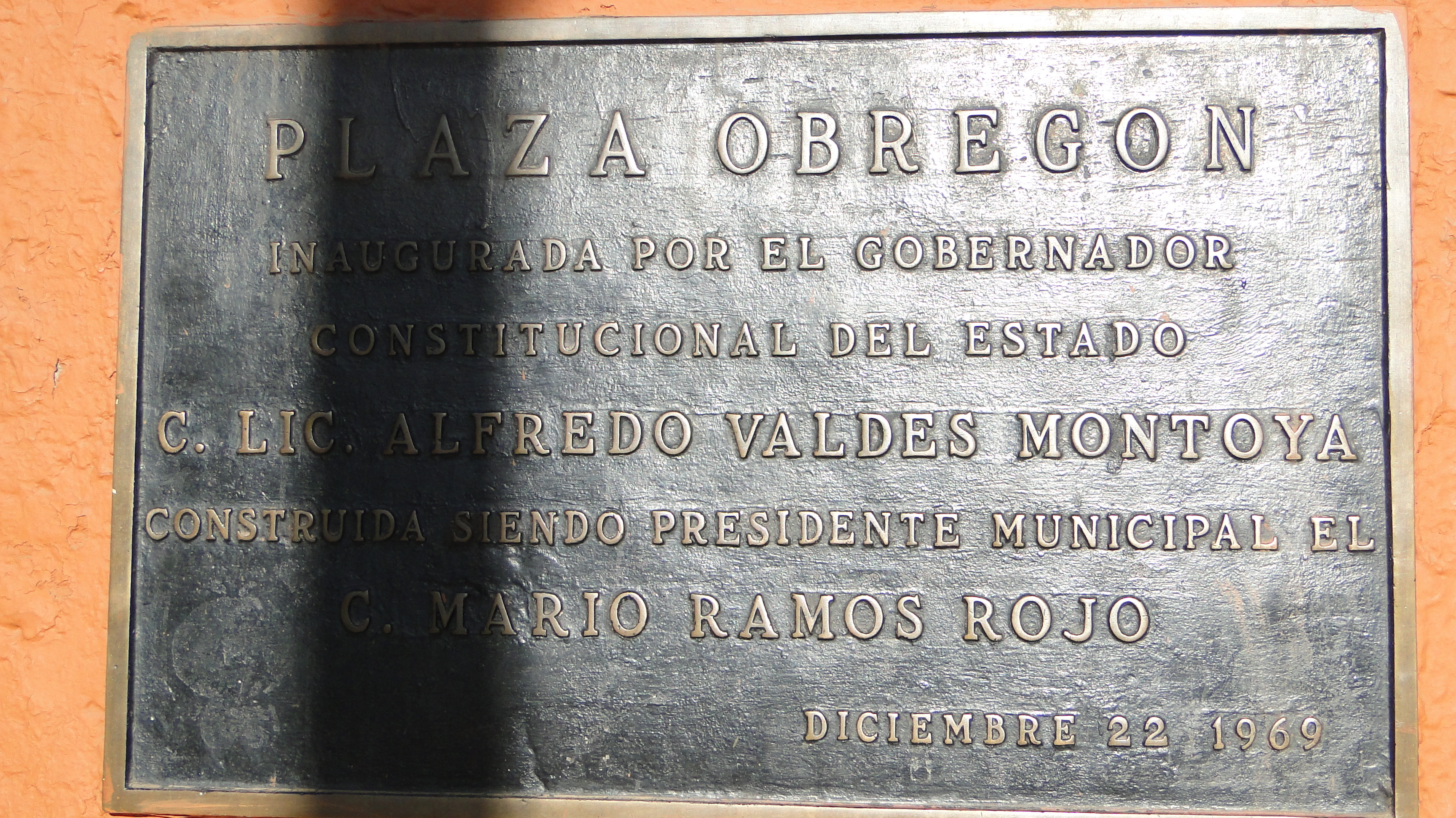 Placa de Culiacán